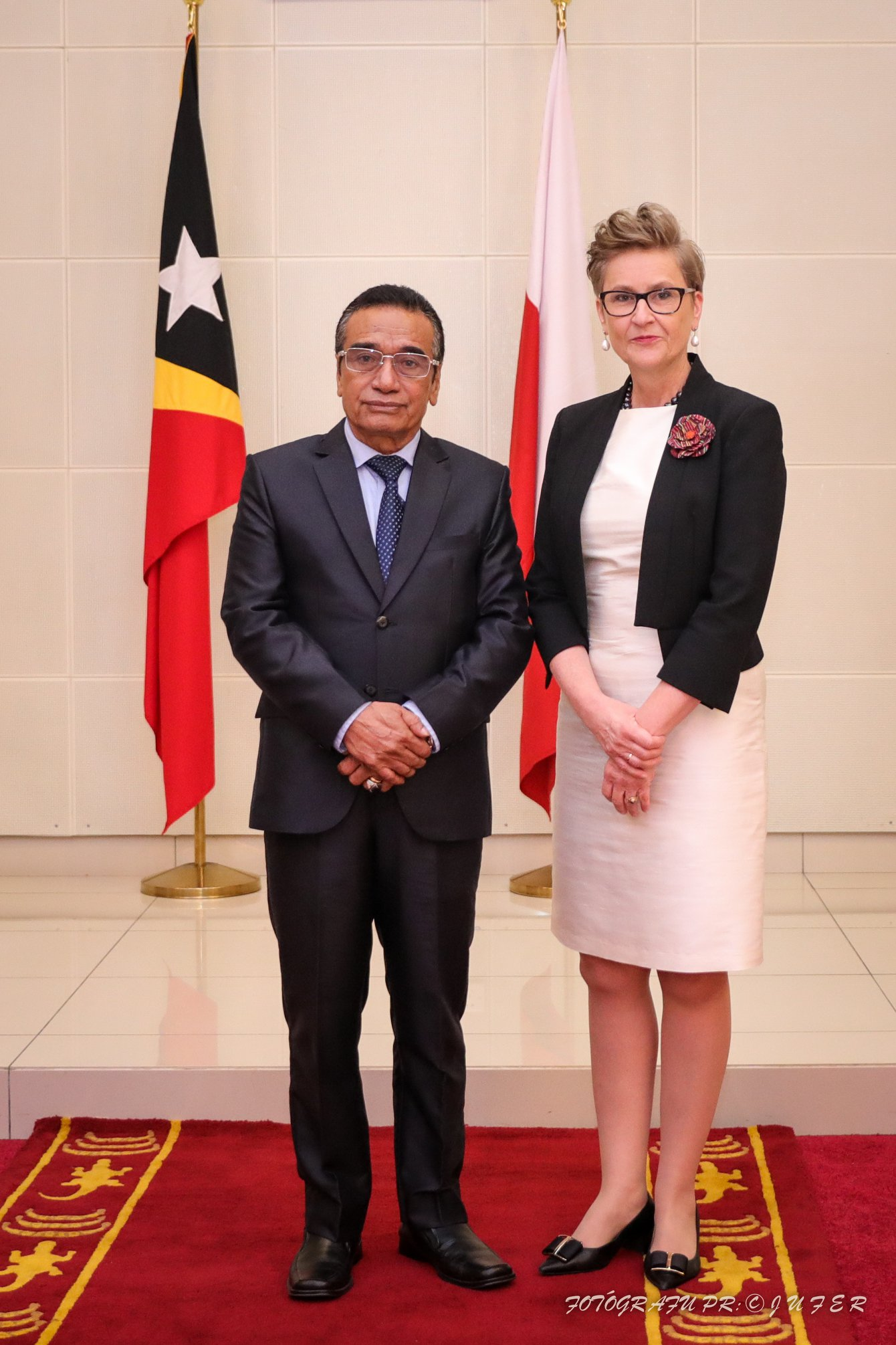 Präsident Francisco Guterres nimmt die Akkreditierung der neuen Botschafter in Osttimor entgegen: Finnland: Jari Sinkari Vereinigtes Königreich: Owen John Jenkins Polen: Beata Stoczynski Tetun: Prezidente Repúblika Francisco Guterres Lú Olo, ohin, simu karta kredensiál husi Embaixadór Finlandia, Jari Sinkari, Embaixadór Reinu Unidu, Owen John Jenkins, no Embaixadora Polónia, Beata Stoczynski atu hametin liután kooperasaun no amizade ho Timor-Leste.